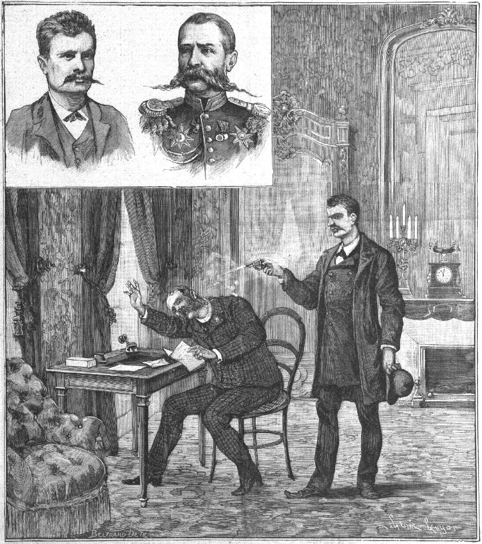 "L'assassinat du général russe Séliverstoff. Portraits du meurtrier et de la victime".